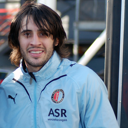 Stefan Babović (Servisch Cyrillisch: Стефан Бабовић) (Berane, 7 januari 1987) is een Servische voetballer